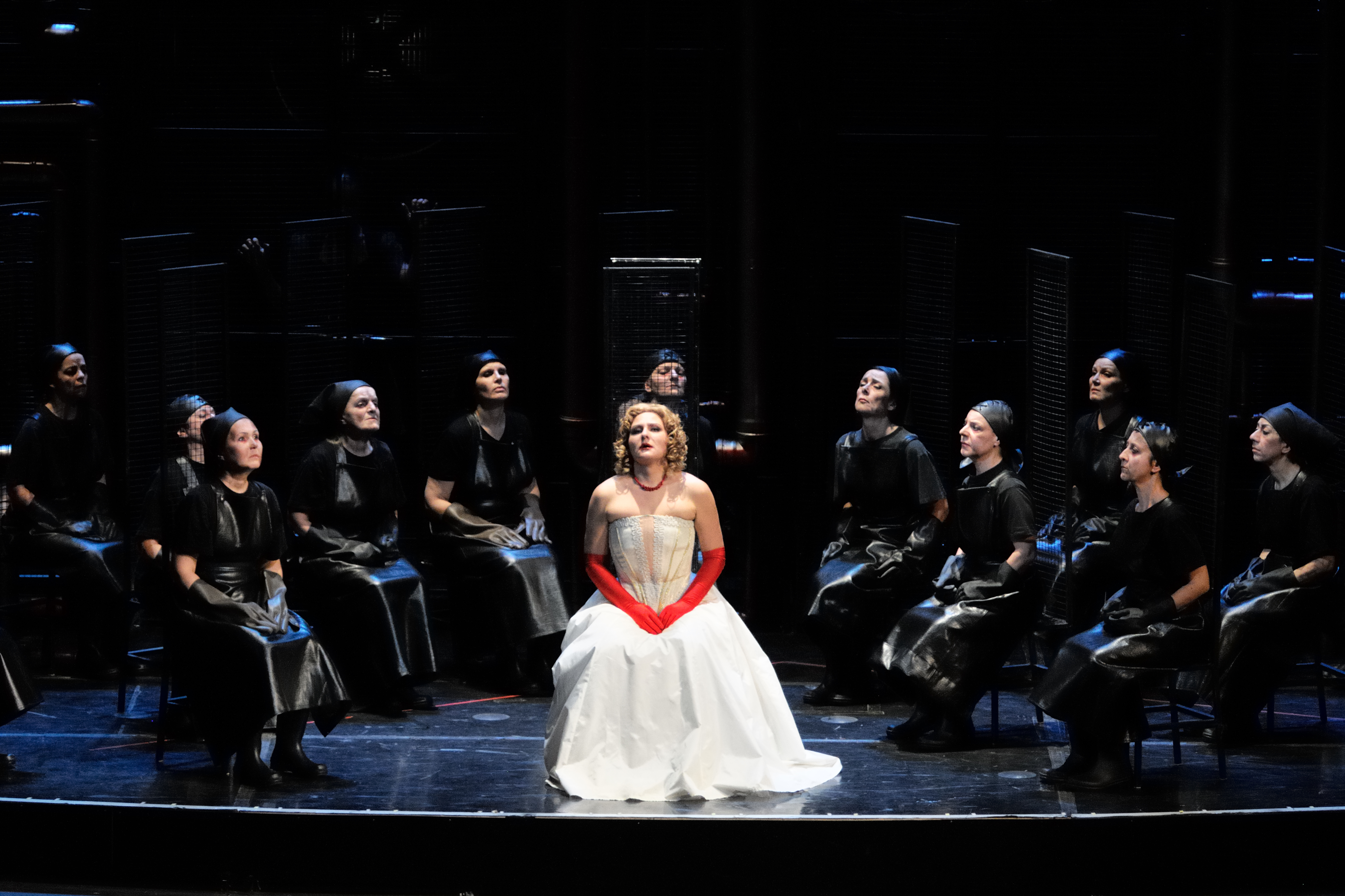 Teatro Comunale Bologna 5 dicembre 2014 Lady Macbeth nel distretto di Mcensk Dmitrij Dmitrievič Šostakovič Opera in quattro atti Katerina L'vovna Izmailova: Svetlana Sozdateleva (Светлана Создателева) Direttore Vladimir Ponkin Regia Dmitry Bertman Assistente alla regia ILJA ILJIN Maestro del Coro Andrea Faidutti Scene Igor' Neznyj Costumi Tat'jana Tulub'eva Helikon Opera Moscow, Teatro Comunale Bologna